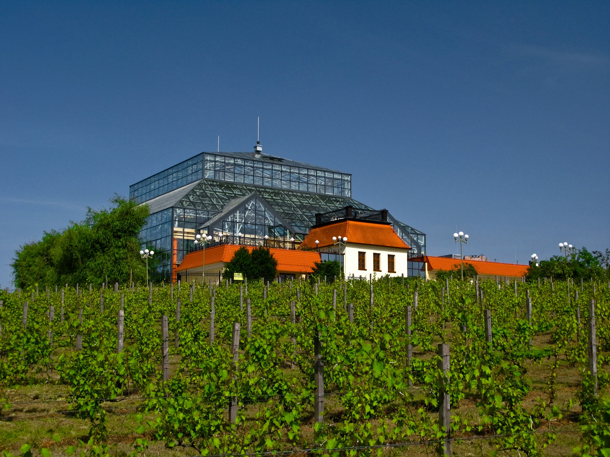 Palmiarnia Zielonogórska, widok od strony północno-zachodniej.